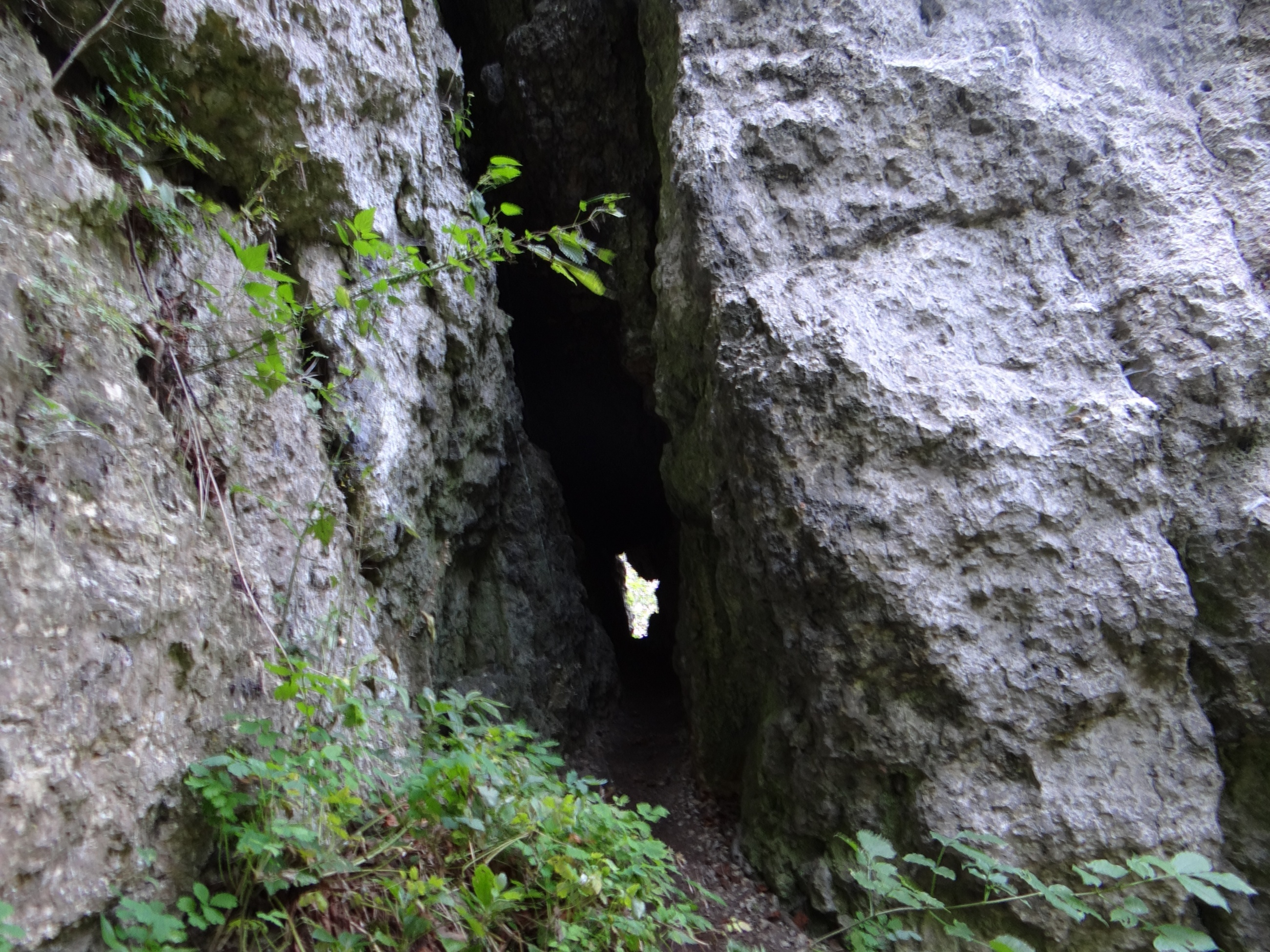 Szczelina za Igłą